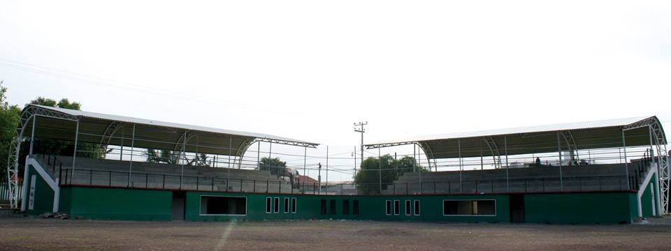 canchas de futbol